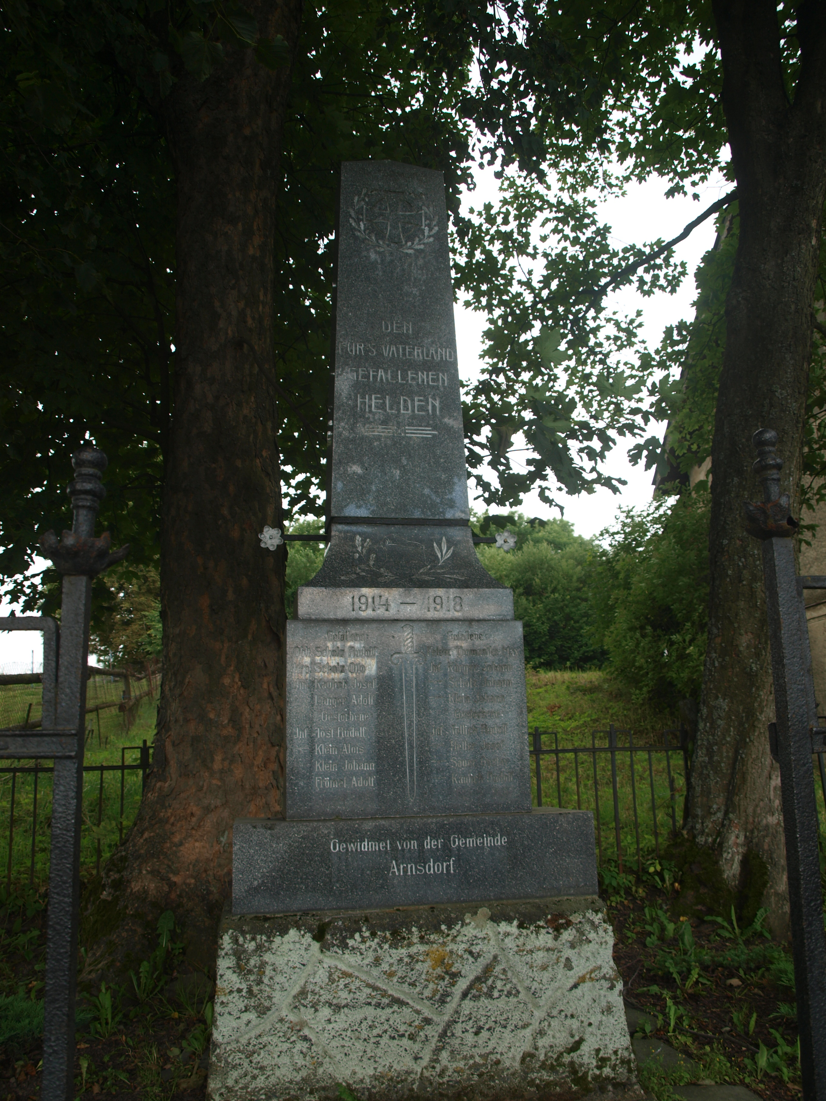 Pomník padlým v první světové válce